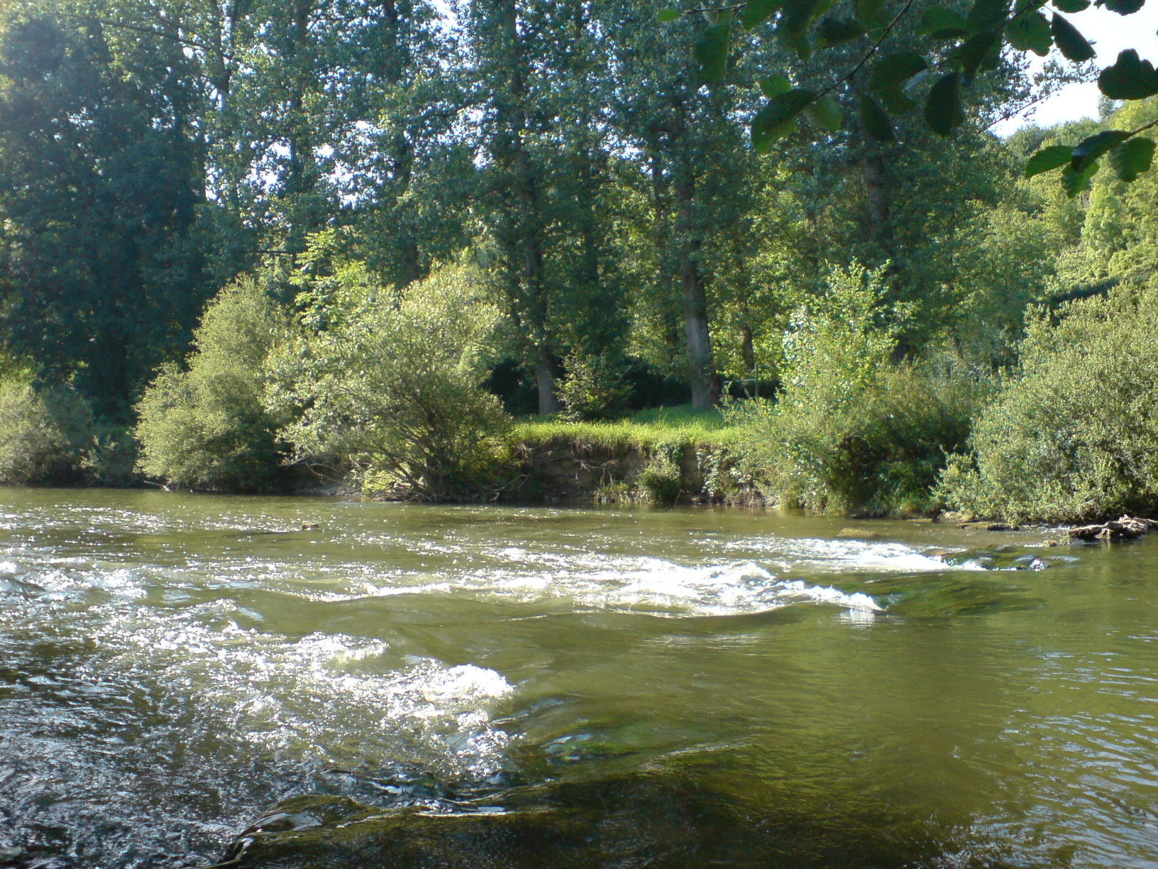 Die Jagst am Alt-Herrensteg, Möckmühl, Anfang August 2009.